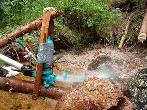 Vodní trkač v "ostrém" provozu na letním táboře oddílu Pterodactylus v roce 2005.